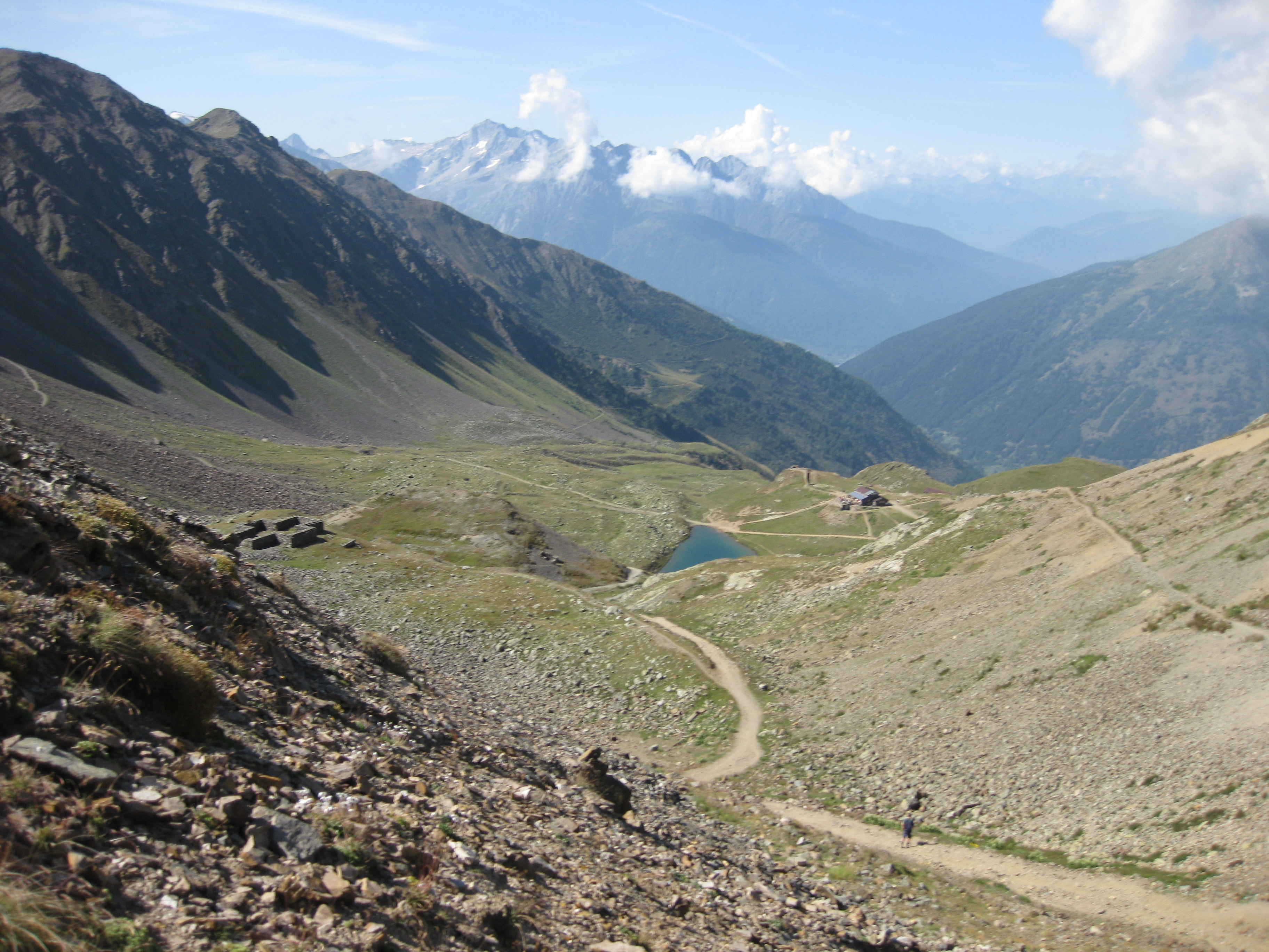 il panorama della conca montozzo oggi